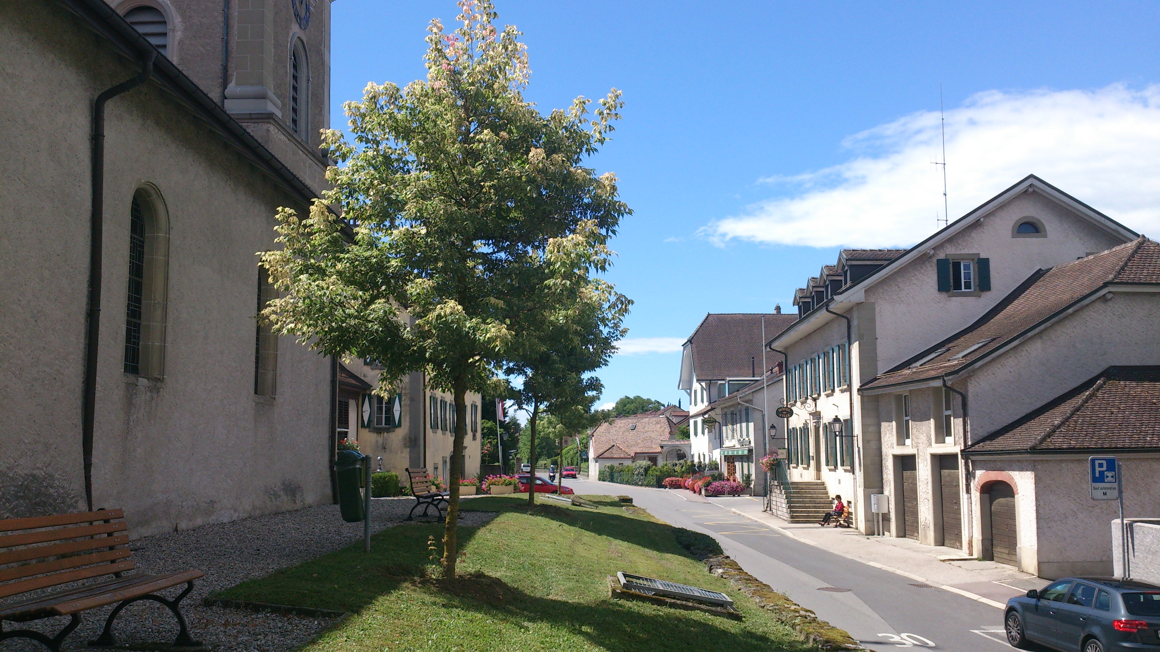 route